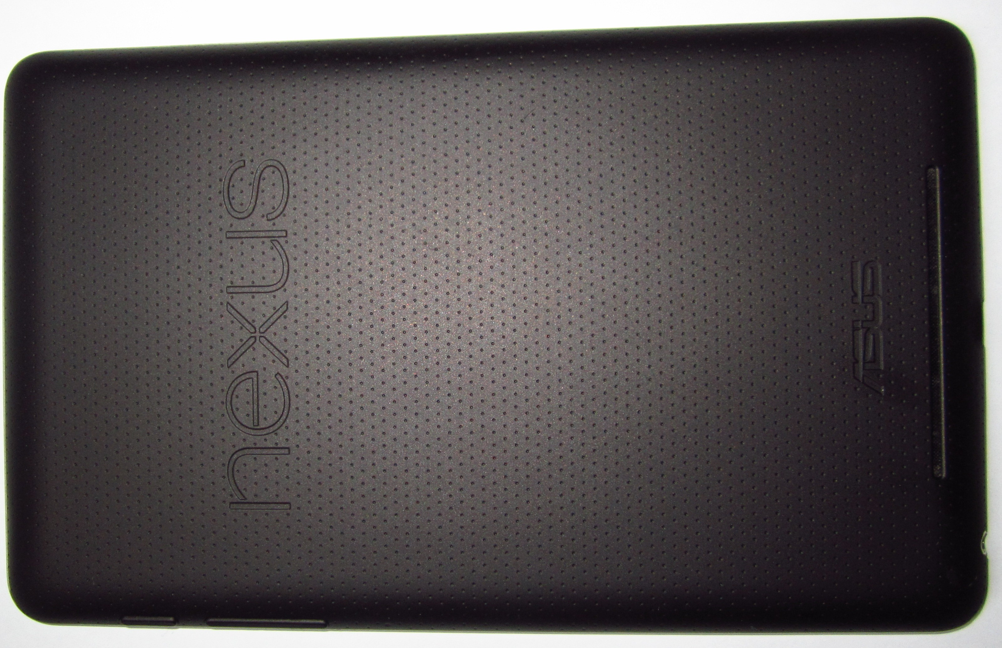 Nex 7 first generation